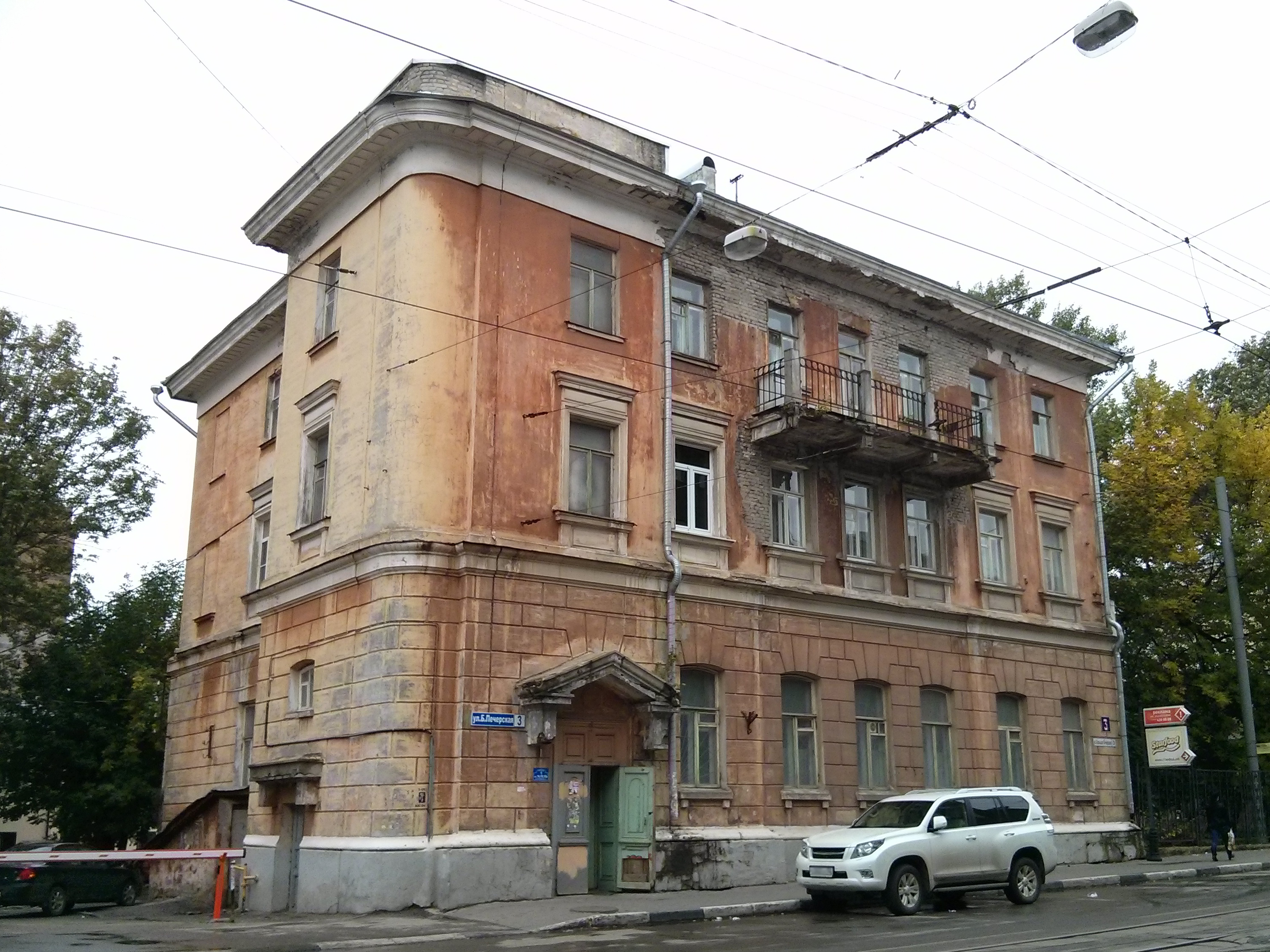 Доходный дом (Нижегородская область, Нижний Новгород, Большая Печерская улица, 3)